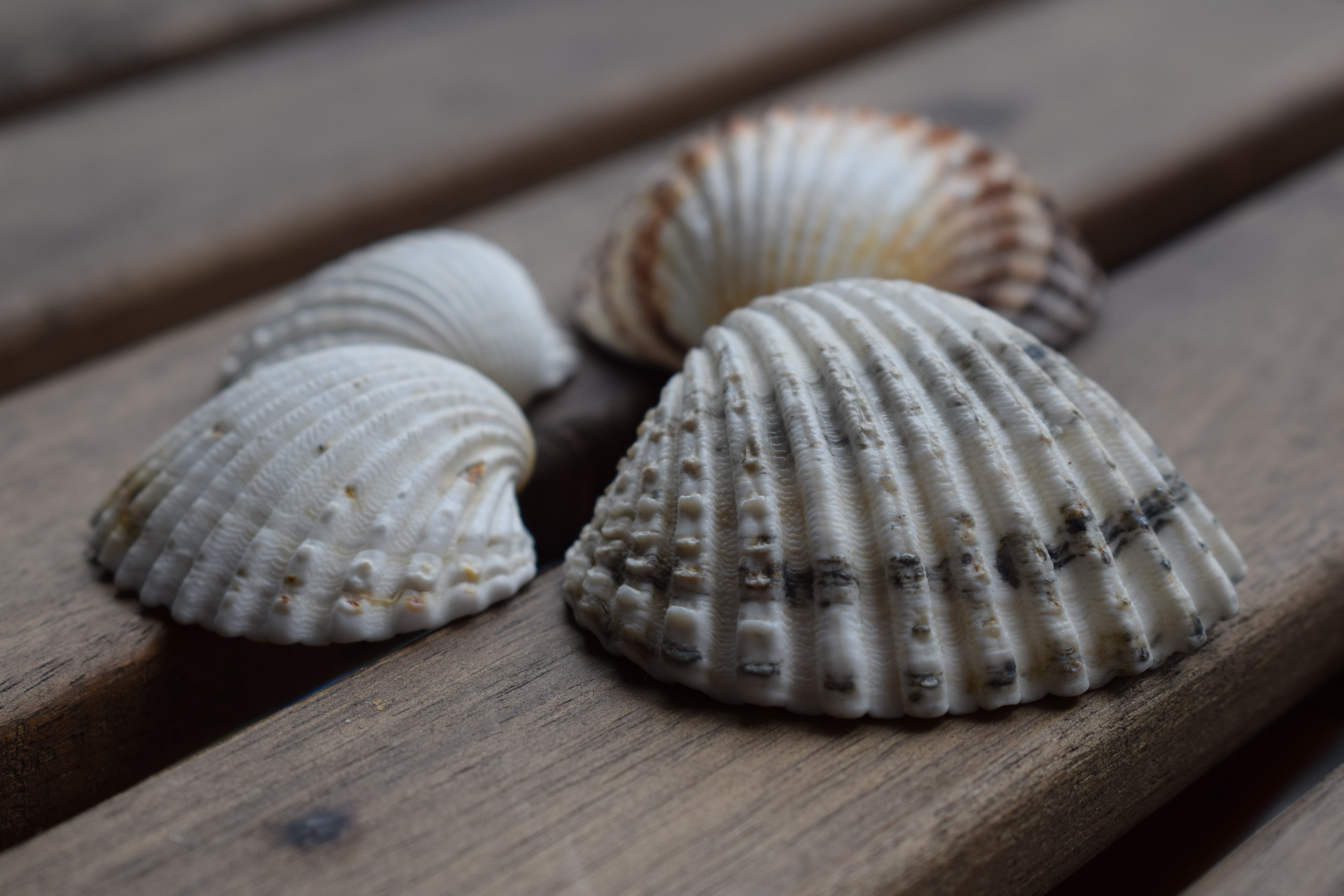 Conchas recogidas en una playa de la provincia de Barcelona y fotografiadas encima de mesa de madera.